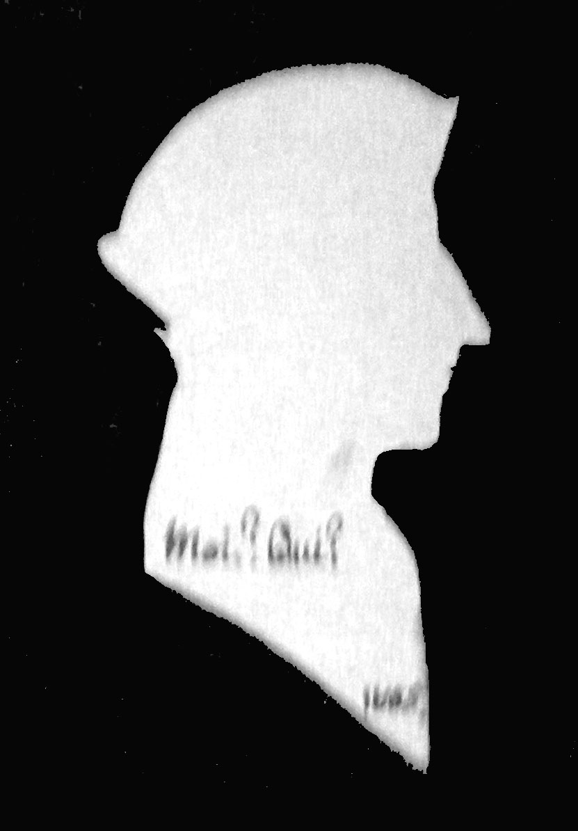 Auto-portrait de Jean-Frédéric Oberlin, pasteur de Waldersbach (Musée Jean-Frédéric Oberlin)